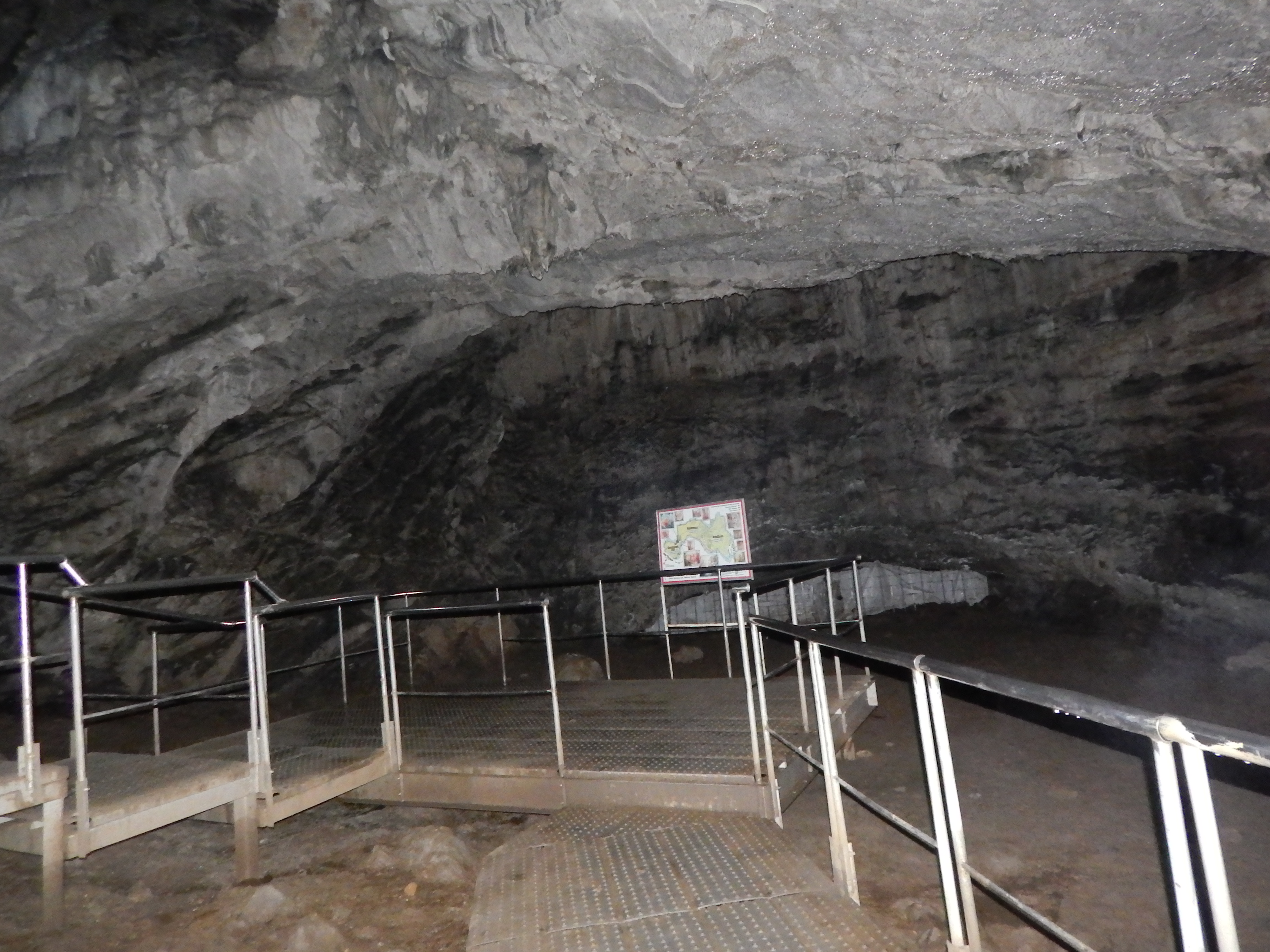 Шульганташ